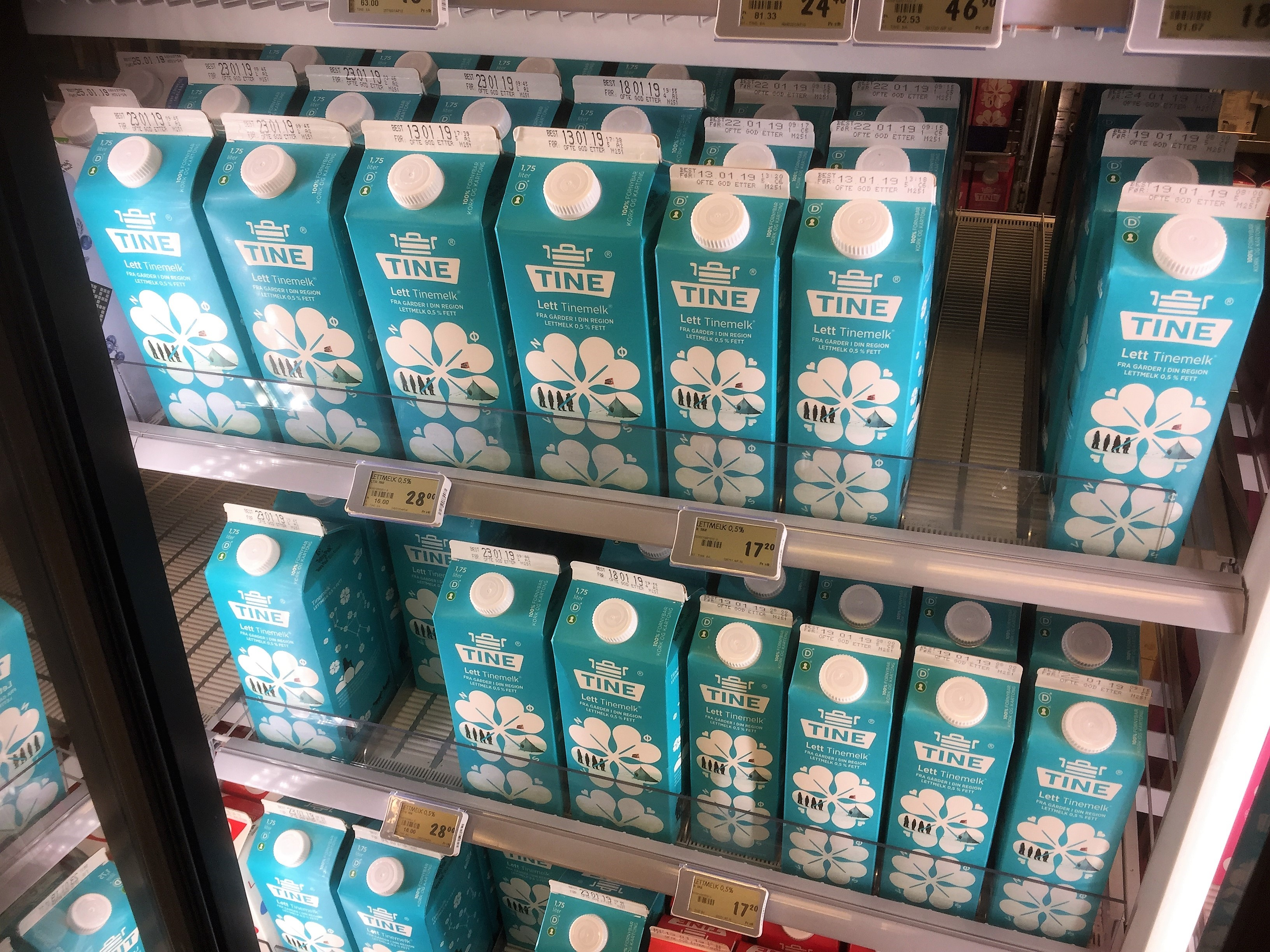 Kartonger med lettmelk av typen som tidligere het "Ekstra lett melk"